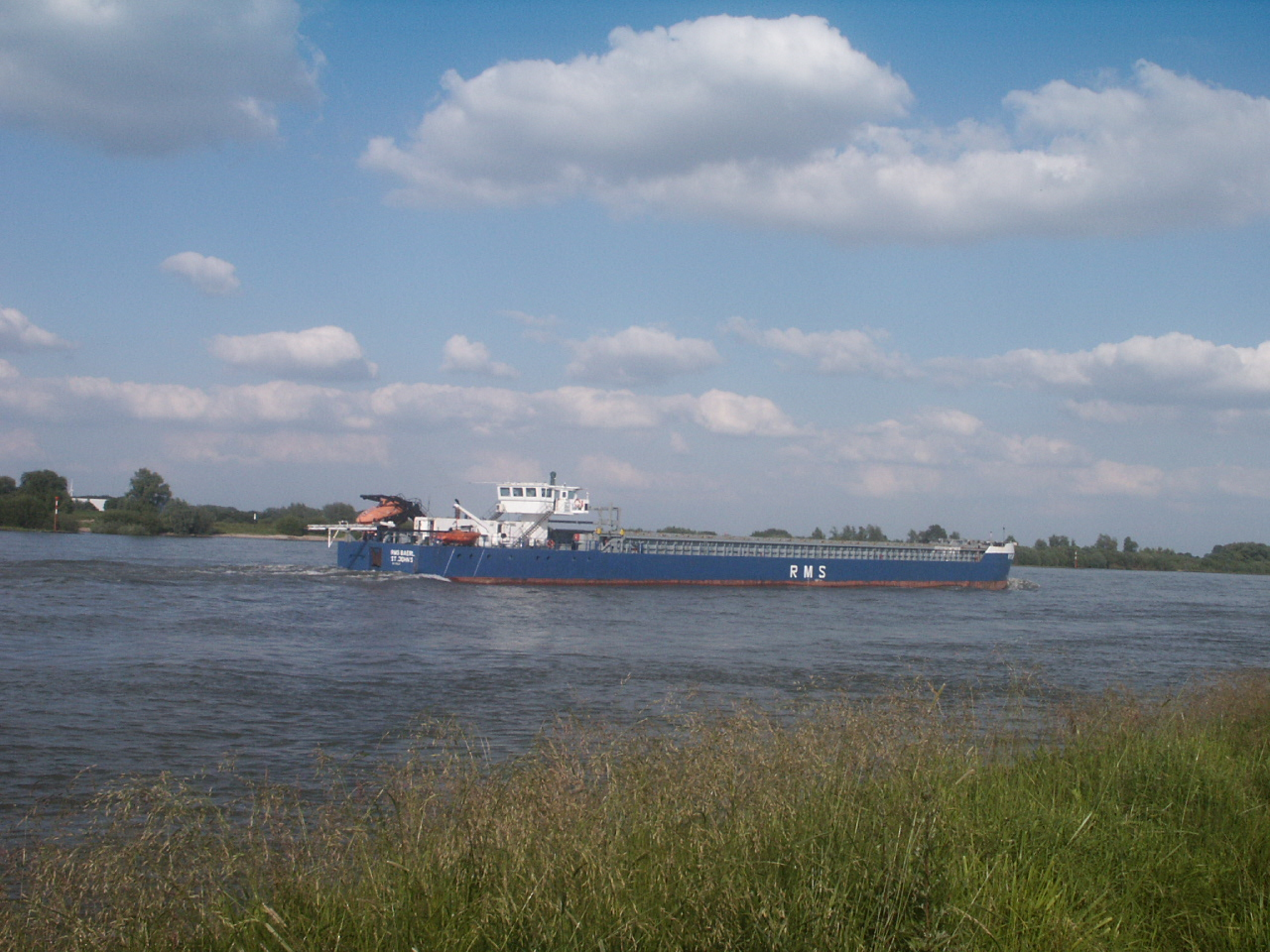 Scheepsverkeer op de Rijn bij Emmerik